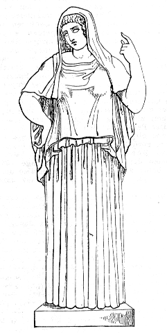 Greek Goddess Hestia